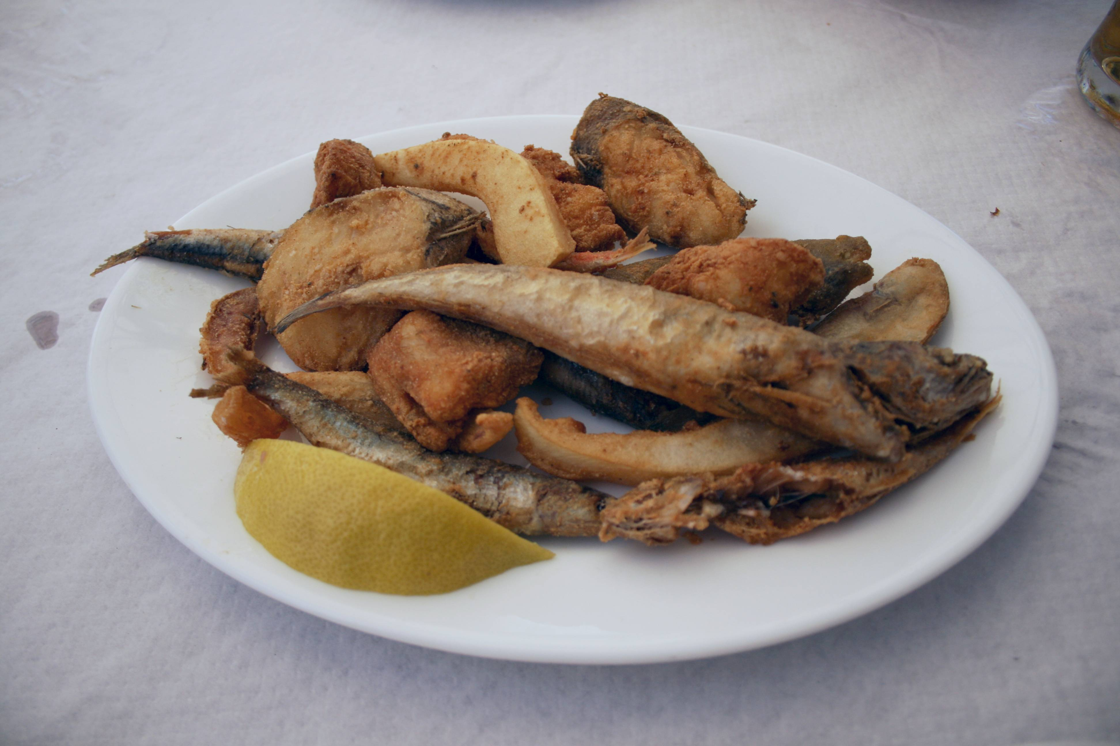 Frito gaditano - Pescados diversos: cazón - pijotas - choclos